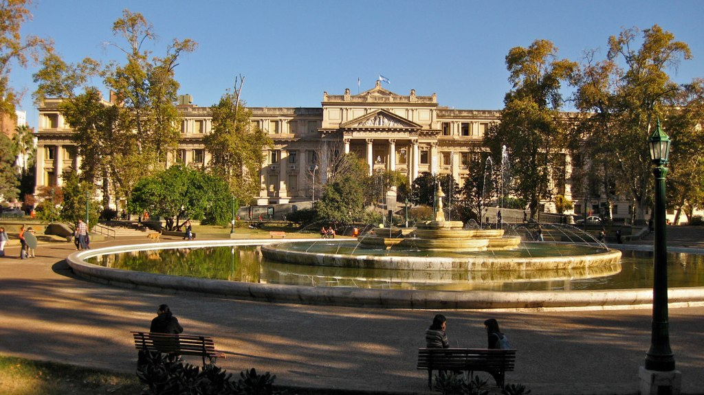 Vista desde la Plaza